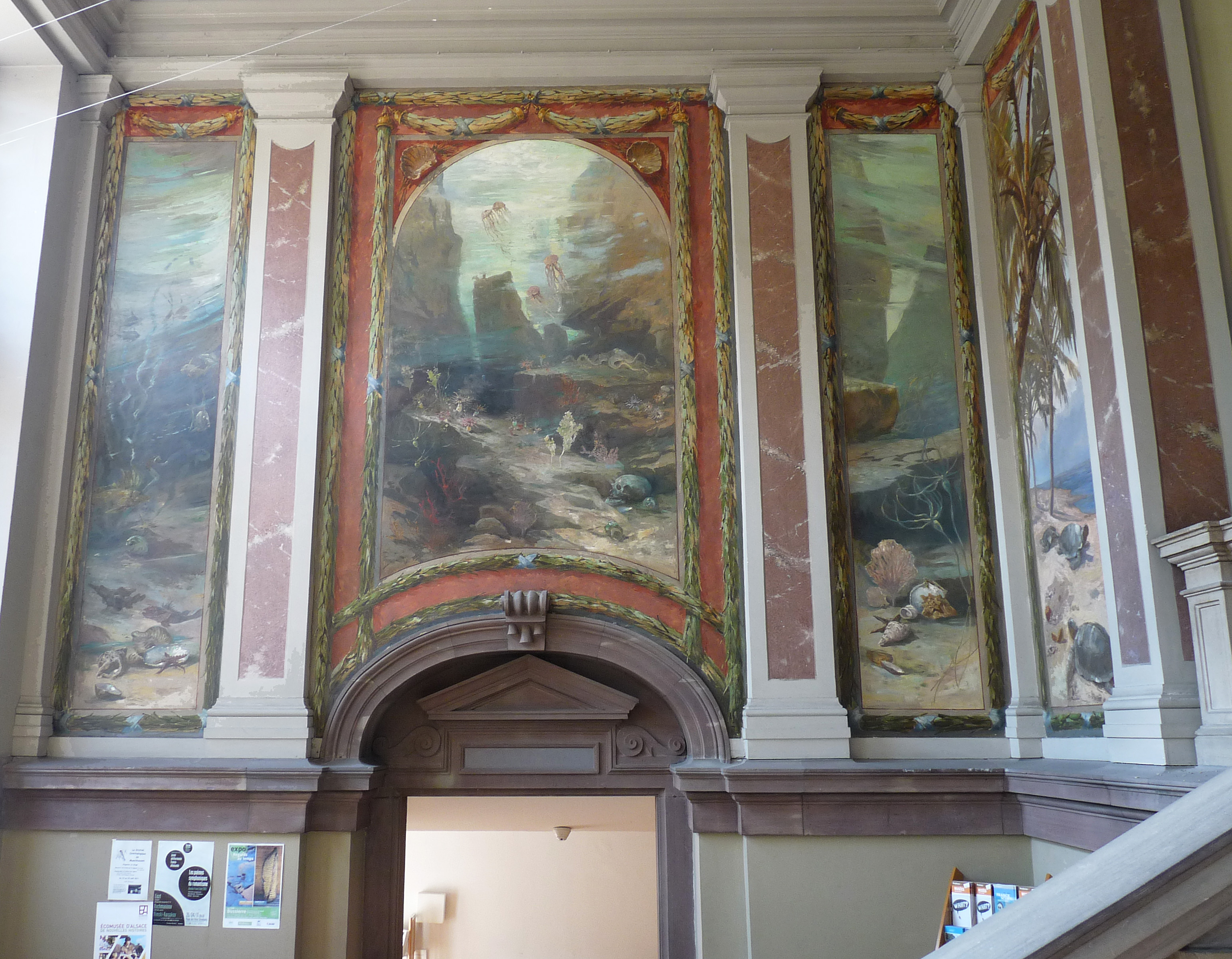 Entrée du Musée zoologique de Strasbourg, peintre Georg Hacker